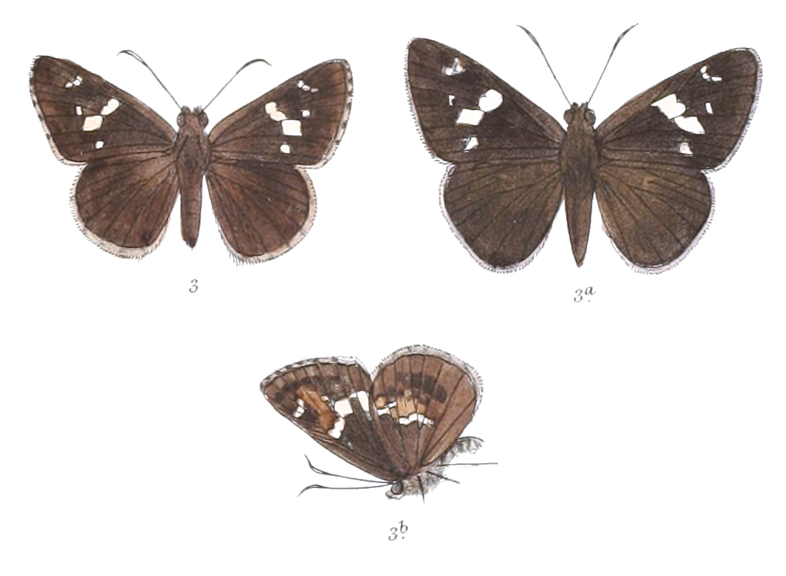 Hyarotis adrastus